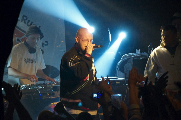 DJ Deszczu Strugi, Pono i Koras podczas koncertu we wrocławskim klubie Alibi